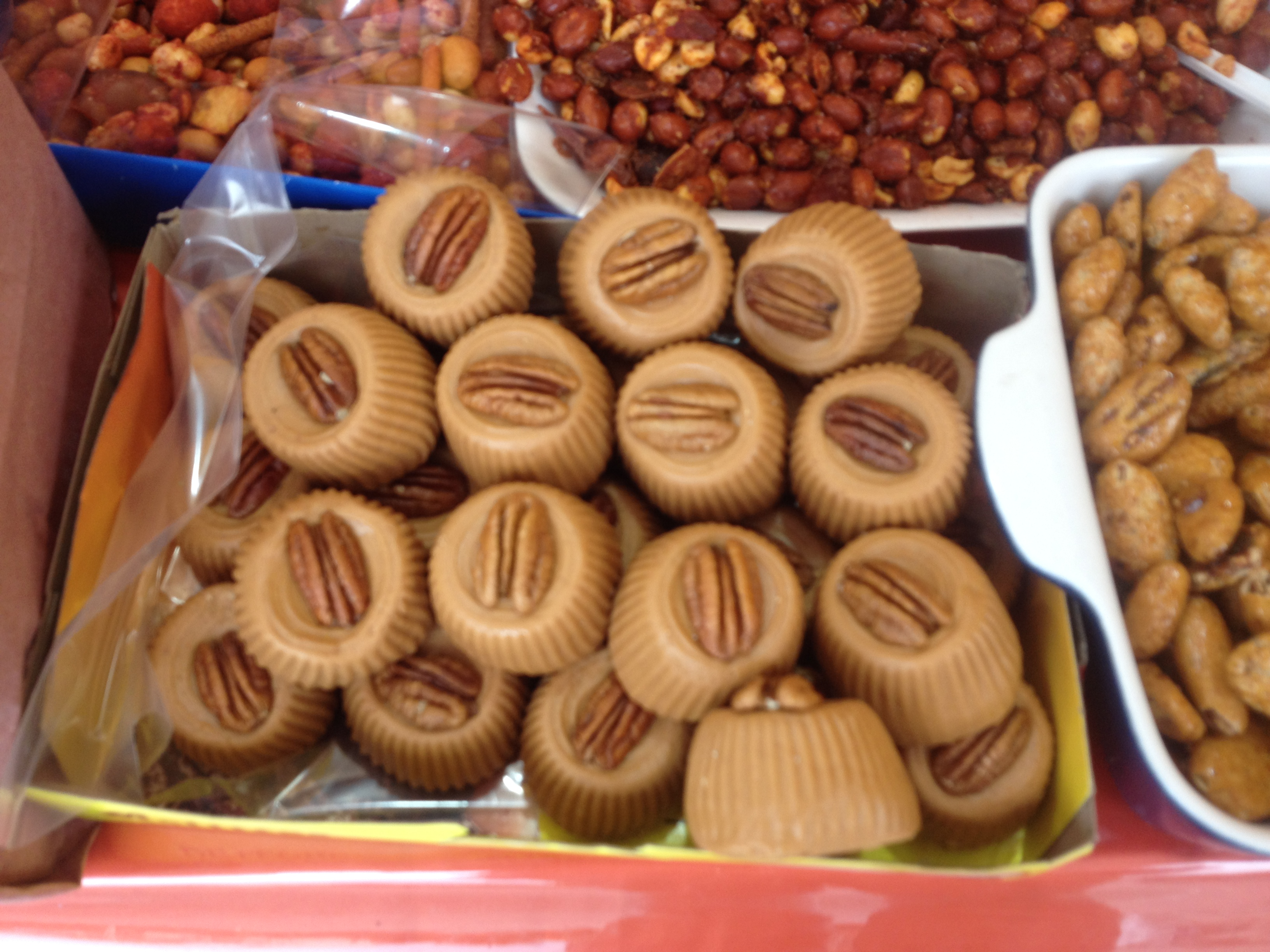 Dulces de leche con almendra del estado de Oaxaca, México presentados en la feria Guelaguetza 2014